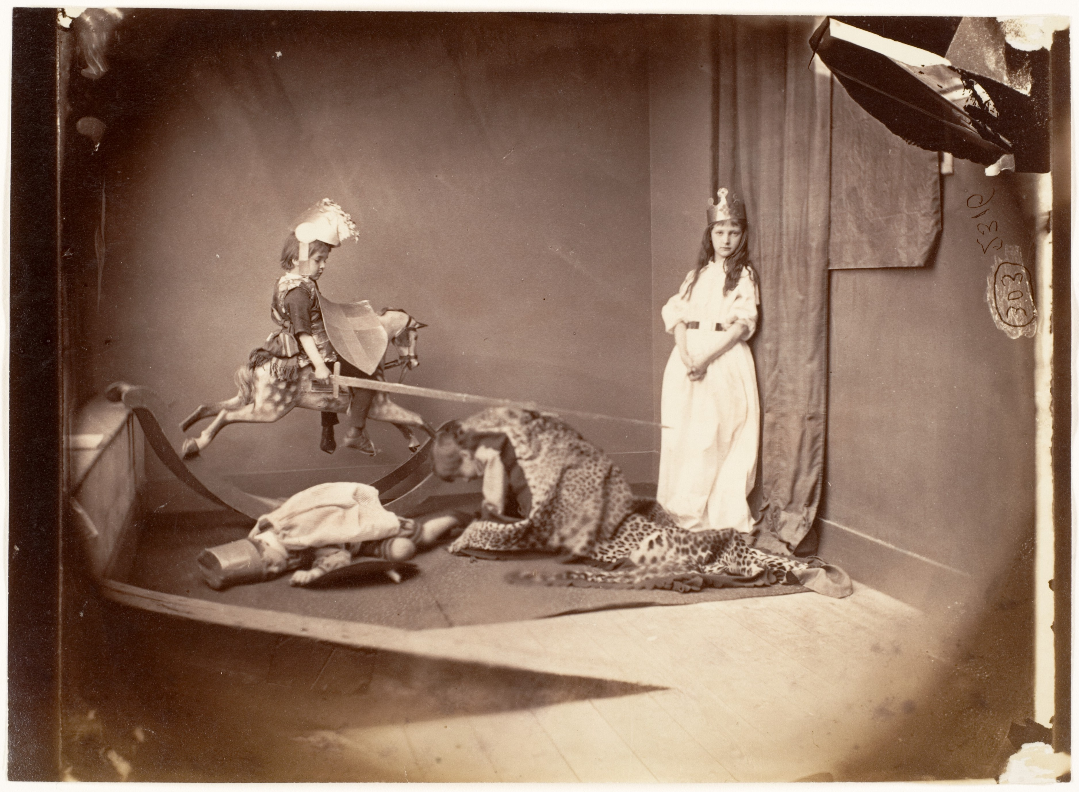 Lewis Carroll (British, Daresbury, Cheshire 1832–1898 Guildford). St George and the Dragon. The Metropolitan Museum of Art